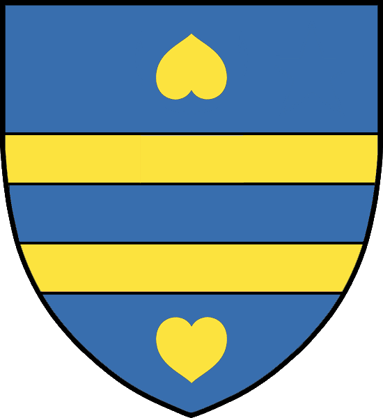 Vapensköld yngre ätten Kurck